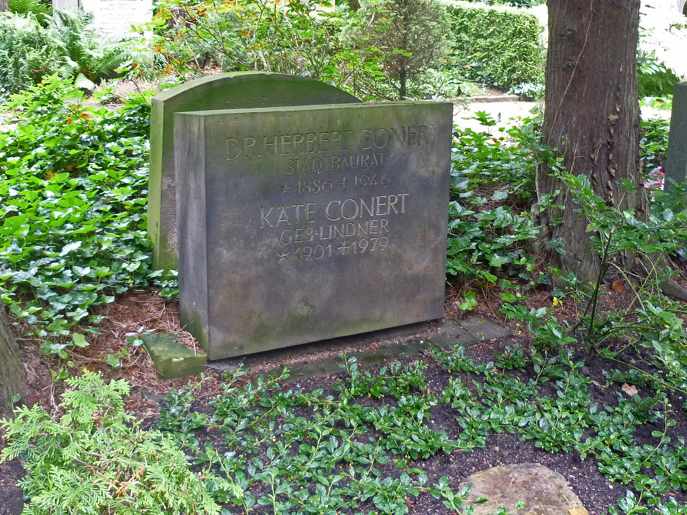 Loschwitzer Friedhof in Dresden-Loschwitz: Grabstätte Herbert Conert (1886–1946), Stadtbaurat